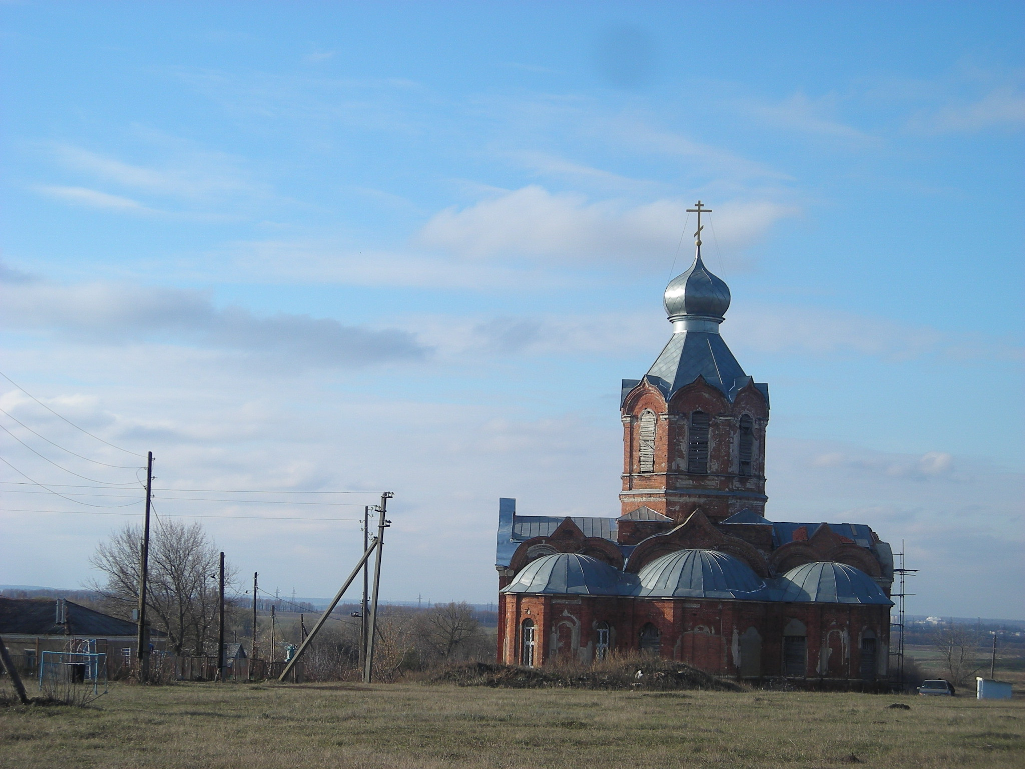 Общий вид села Архангельское —- маленькое село Елецкого района Липецкой области.